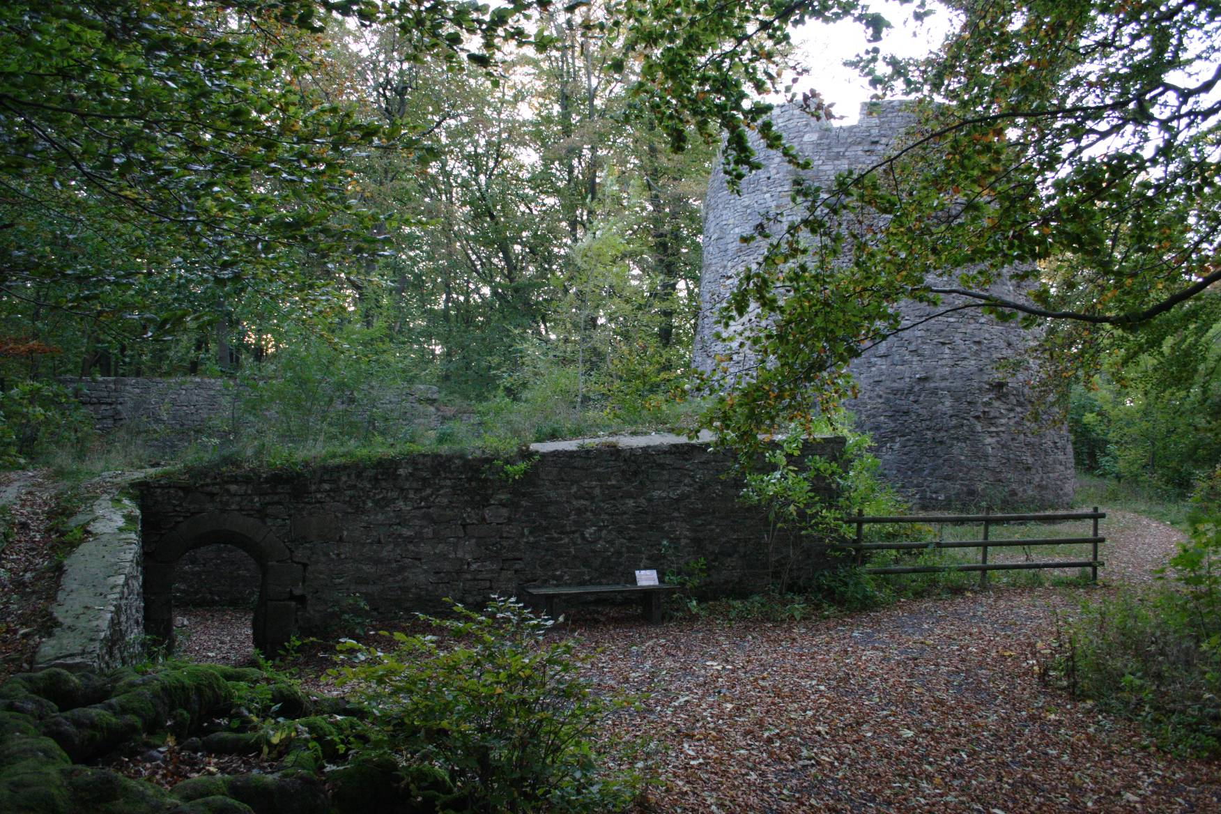 Iburg in Bad Driburg – Ausschnitt der Ruine mit Bergfried